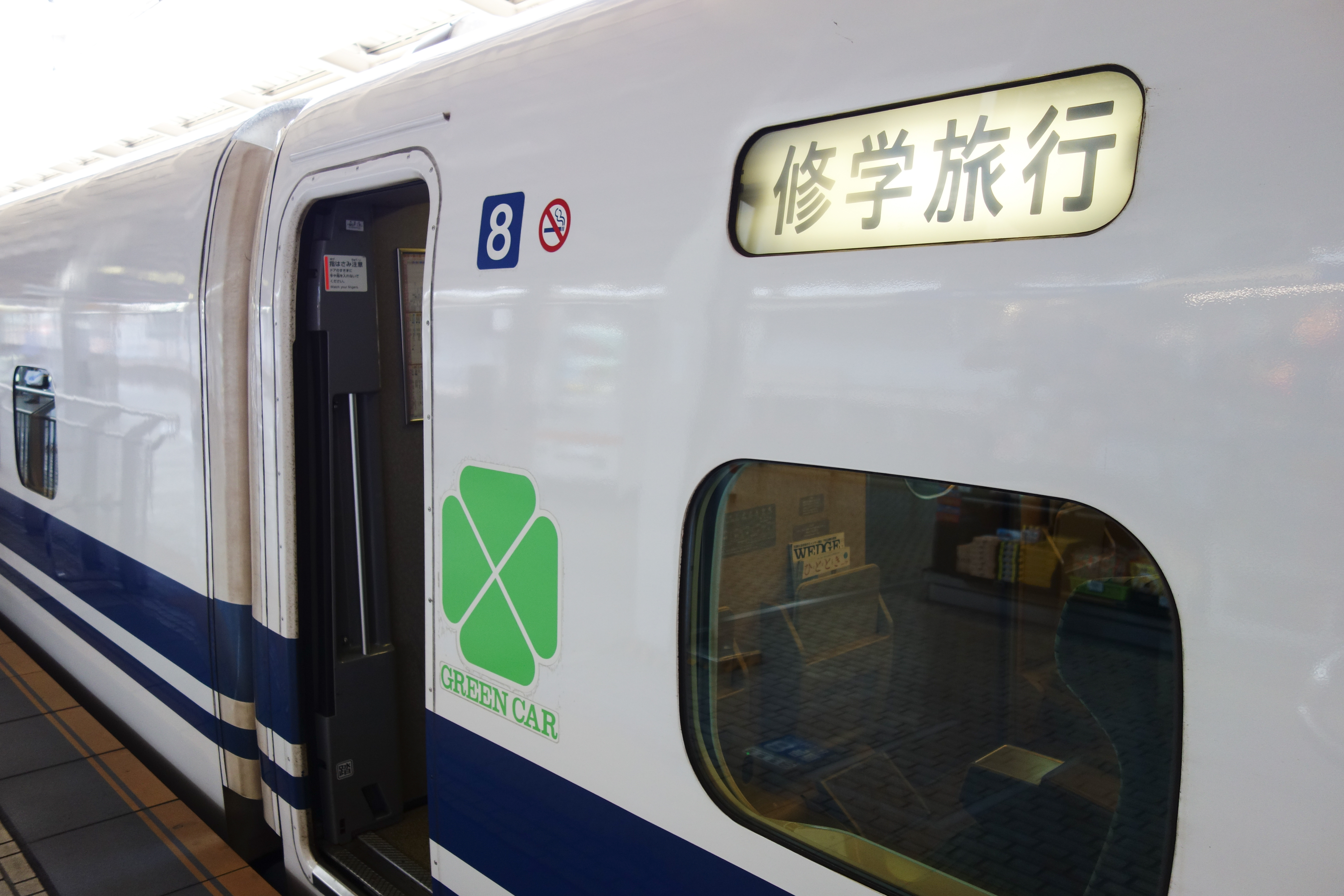 修学旅行列車（700系、JR東海C60編成、新大阪駅）